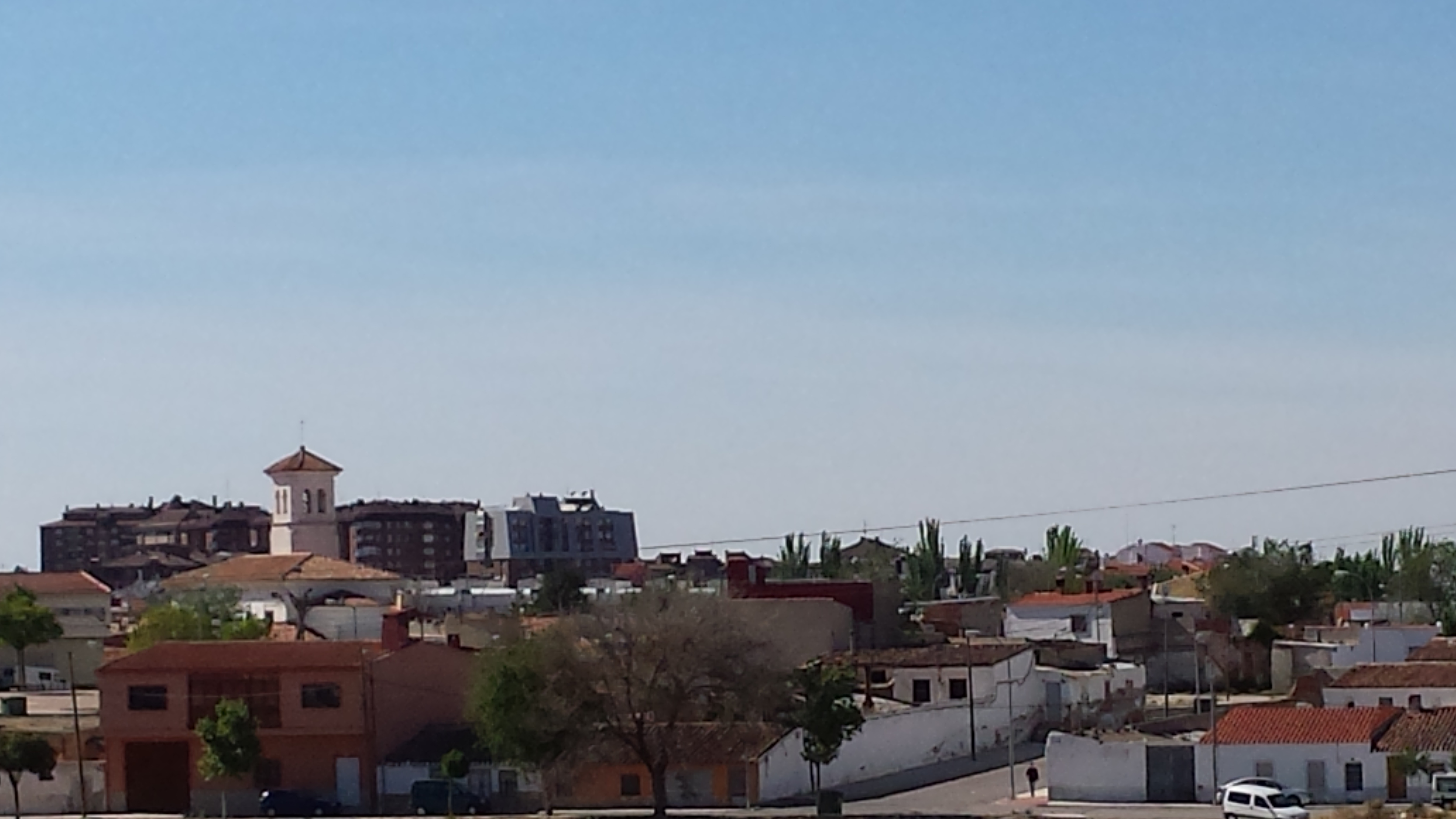 La Estrella (El Cerrico). Torre de la Iglesia Ave María. Albacete